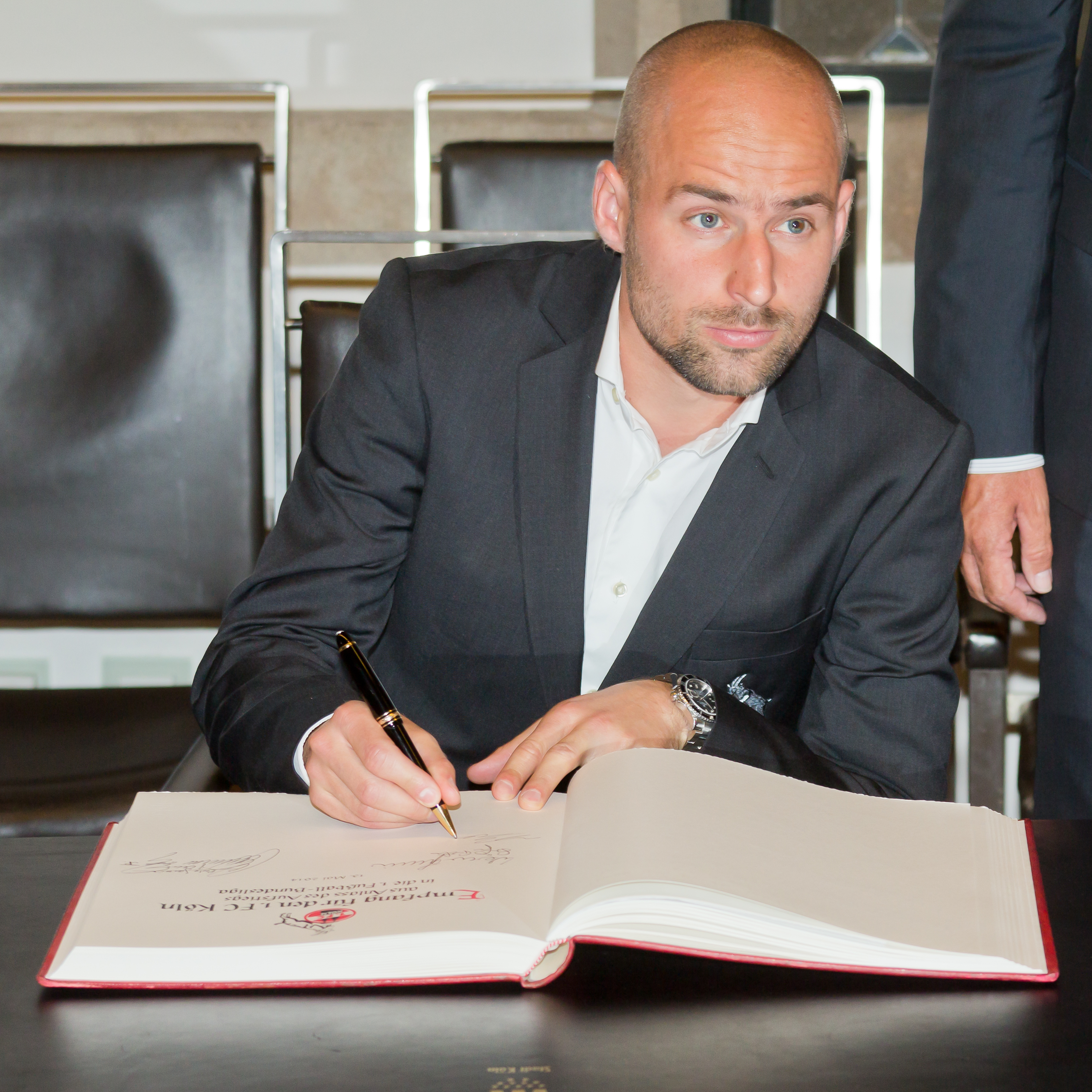 Empfang für den 1. FC Köln im Rathaus nach dem Aufstieg in die 1. Bundesliga 2014 Foto: Mišo Brečko trägt sich in das Gästebuch der Stadt Köln ein